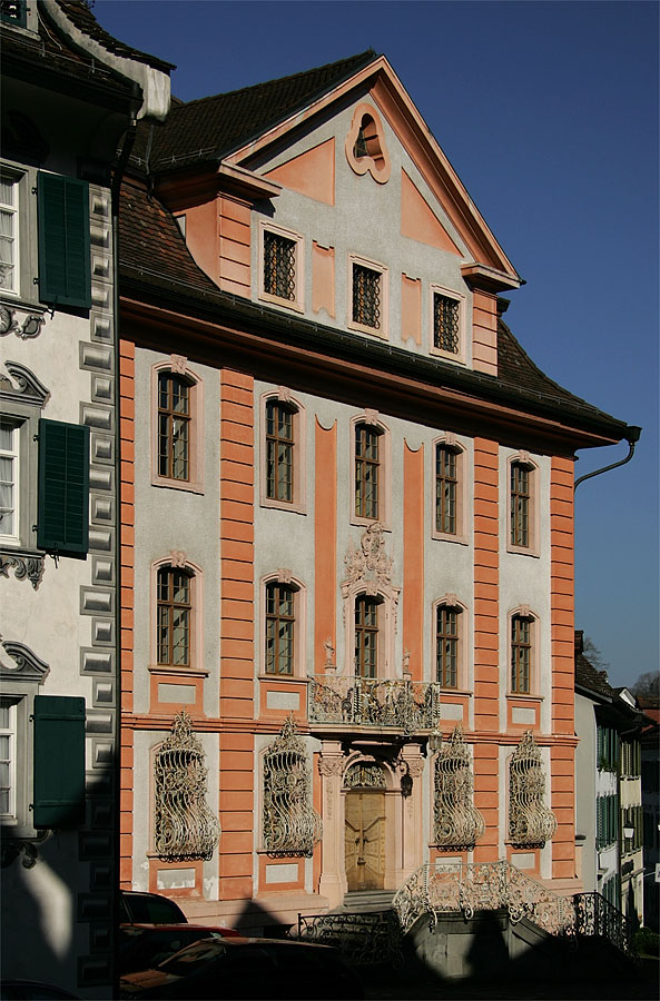 Barockes Rathaus in Bischofszell